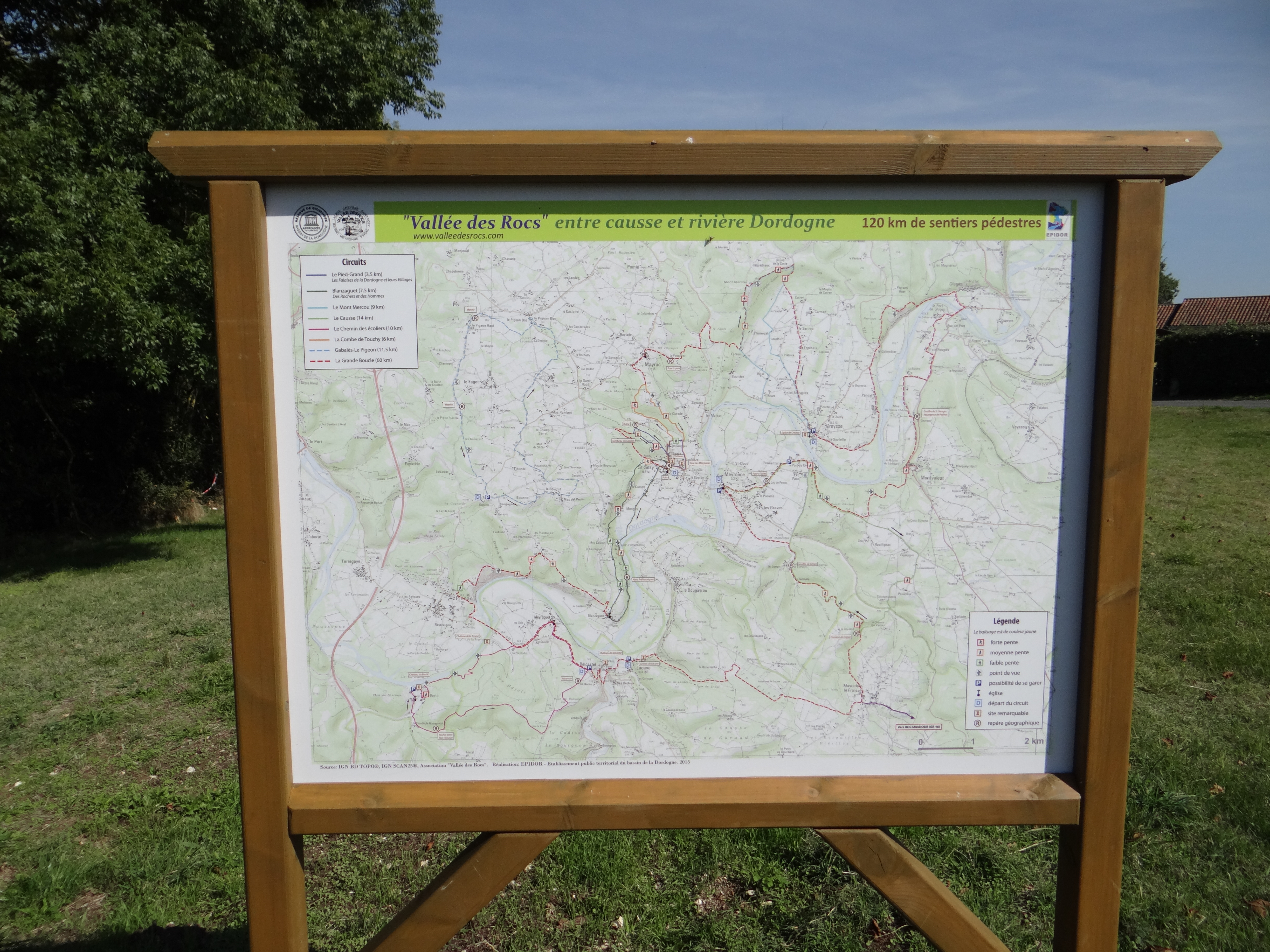 Panneau présentant l'ensemble des sentiers pédestres gérés par l'association Vallée des Rocs, Saint-Sozy (Lot, France)